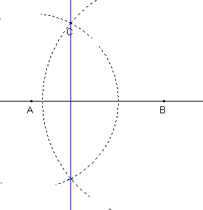 Construction d'une perpendiculaire à la règle et au compas. Image personnelle. Licence GFDL. Utilisateur:HB